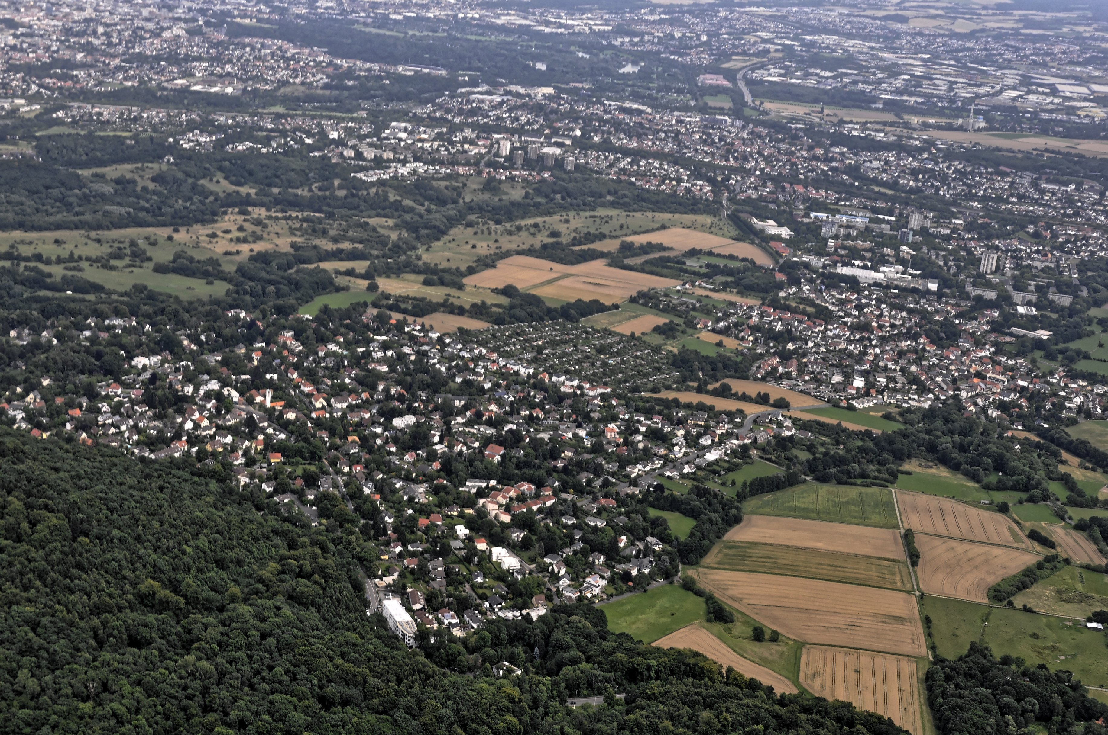 Bilder vom Flug Nordholz-Hammelburg 2015: Kassel-Brasselsberg vorn links, Kassel-Nordshausen vorn rechts.